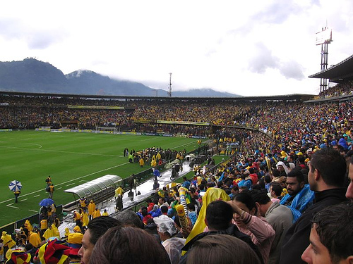 Colombia vs. Brasil